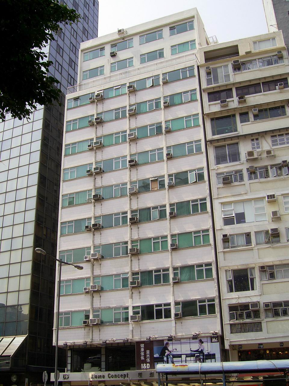 永祥大廈